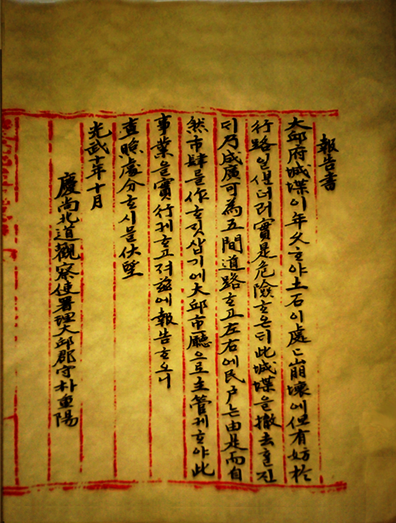 경상북도 관찰사 박중양의 대구읍성 철거 보고서, 1906.10.01일자